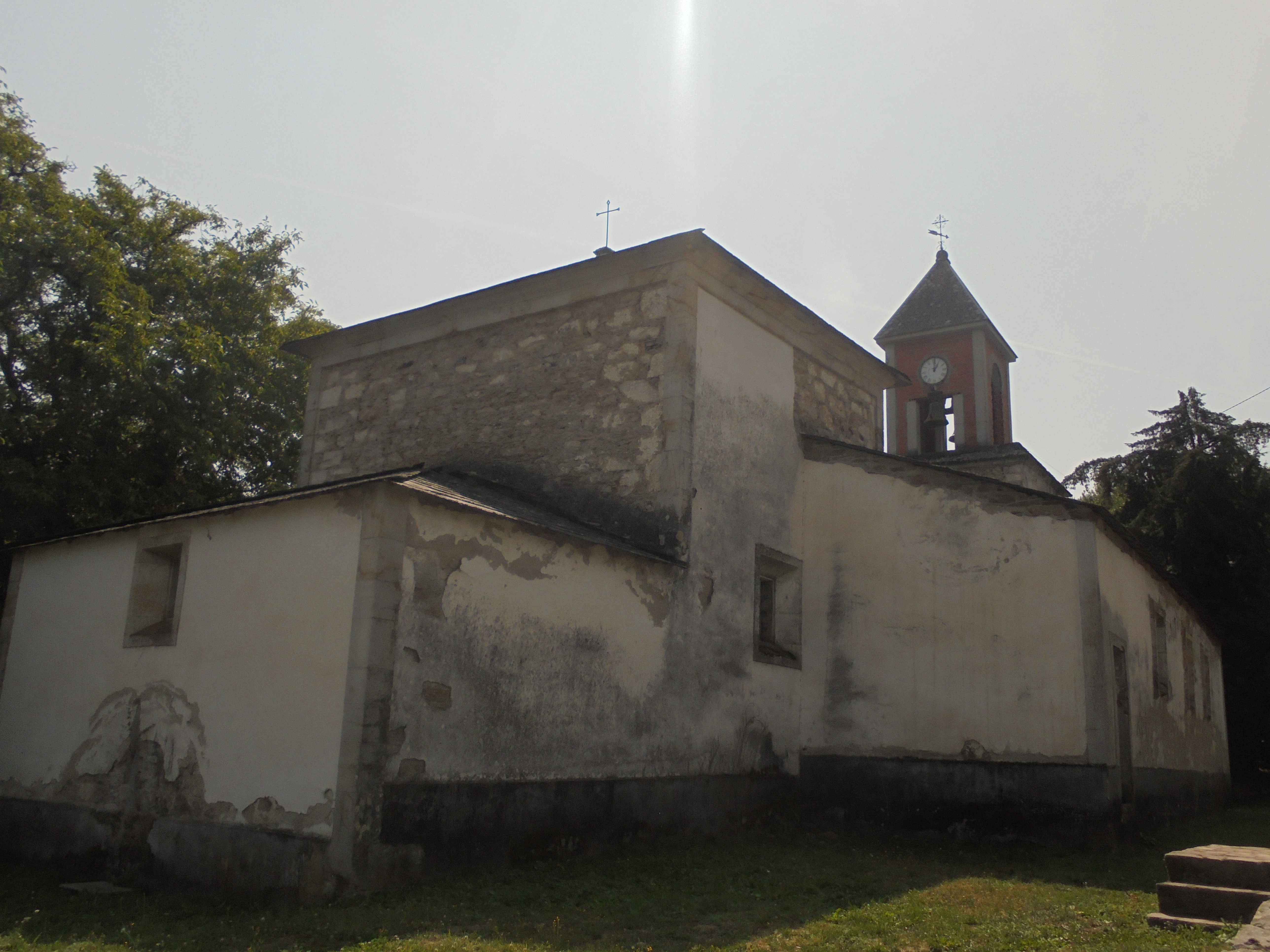 Igrexa parroquial de Penarrubia